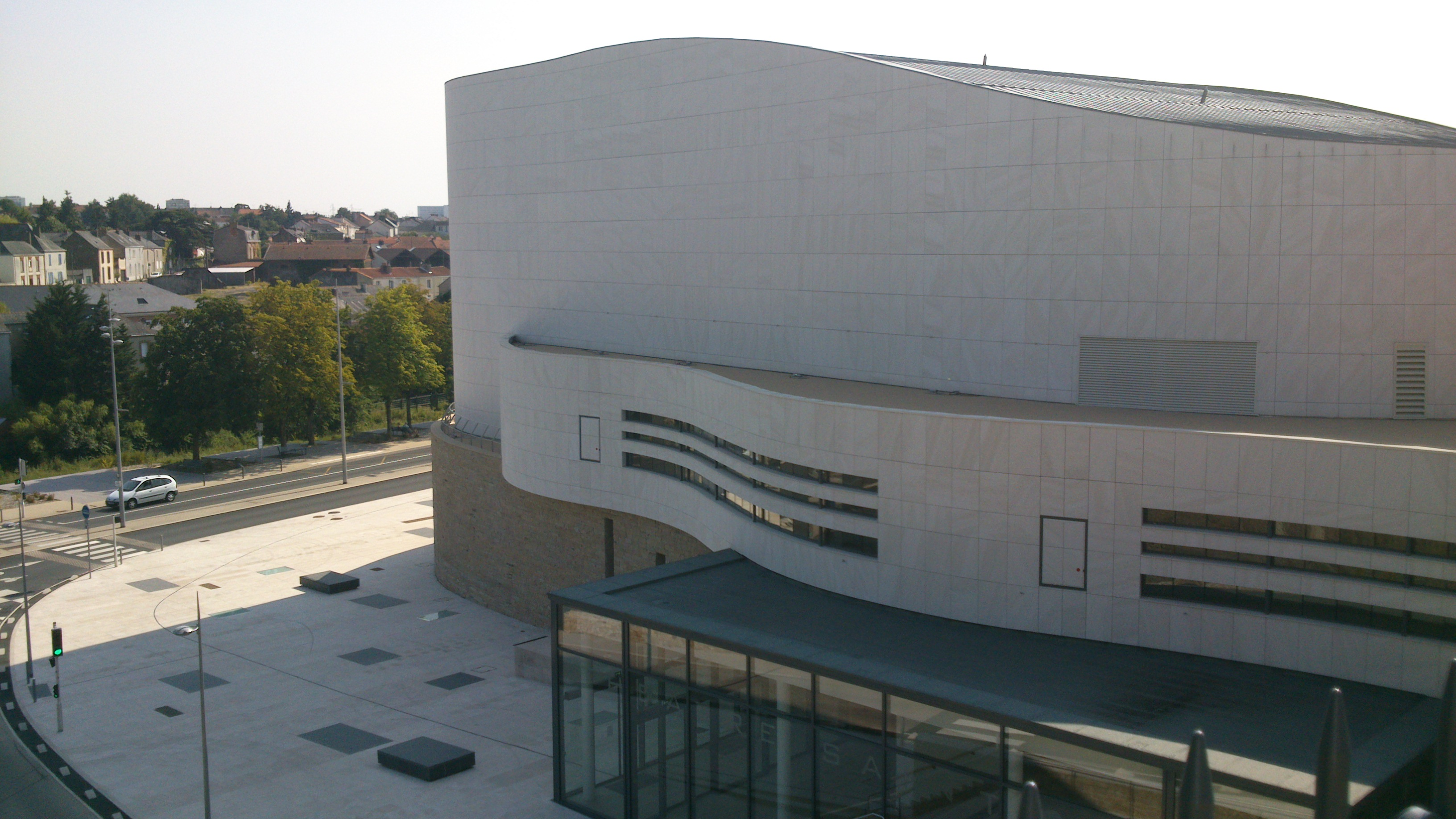 Théâtre Saint-Louis 1